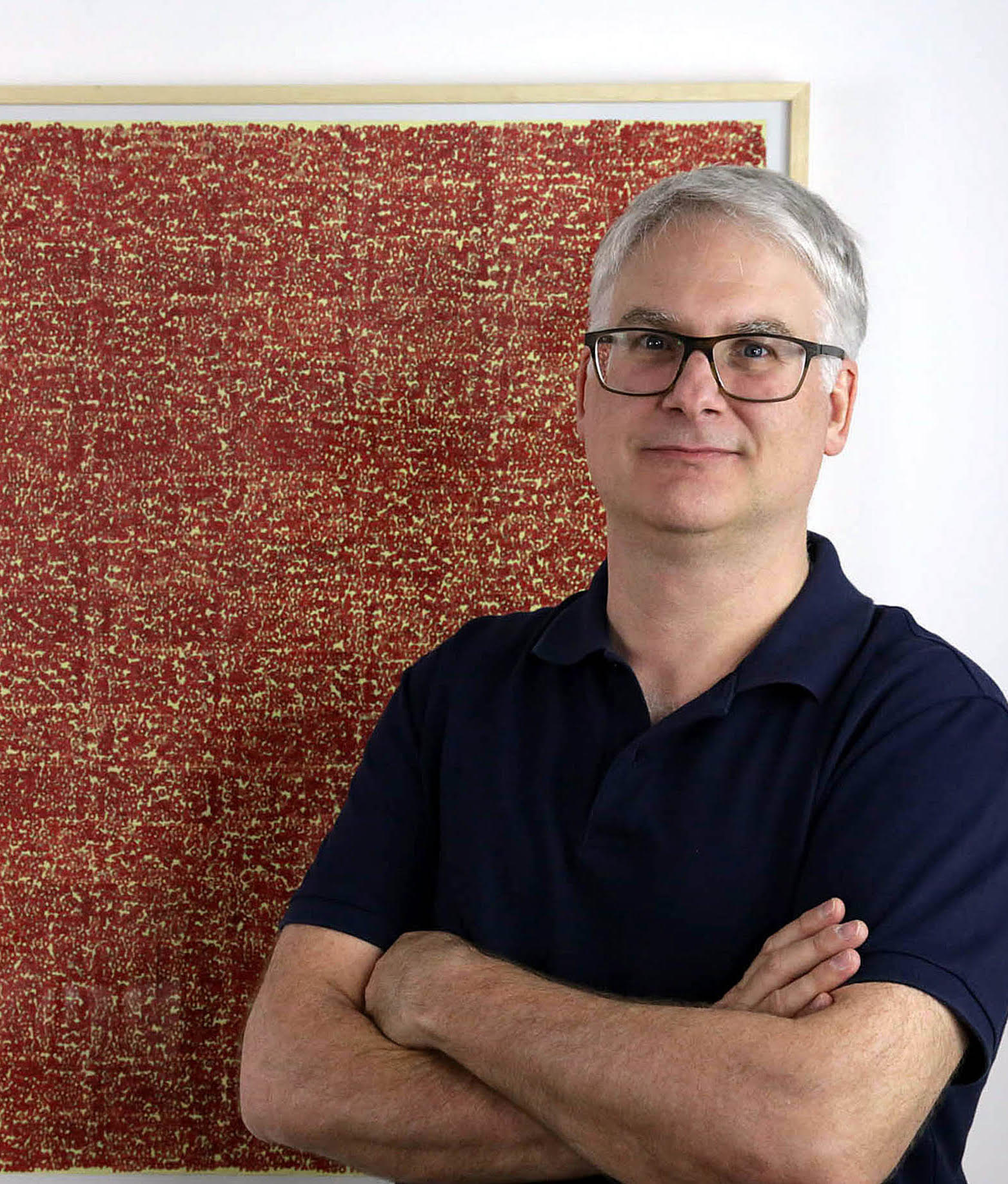 Foto: Melissa Haidar